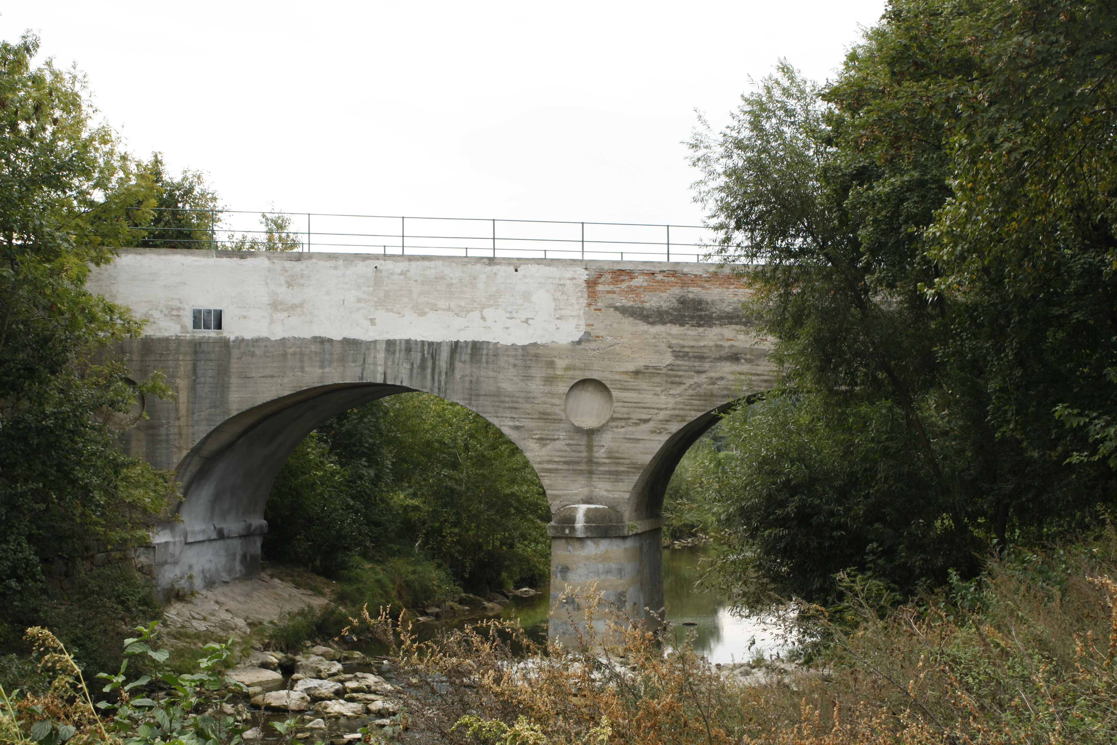 Teesdorf, Niederösterreich: 1840–42 erbauter Triesting-Aquädukt, in dem der Werkskanal der ehemaligen Baumwollspinnerei Teesdorf in offenem Gerinne geführt wird